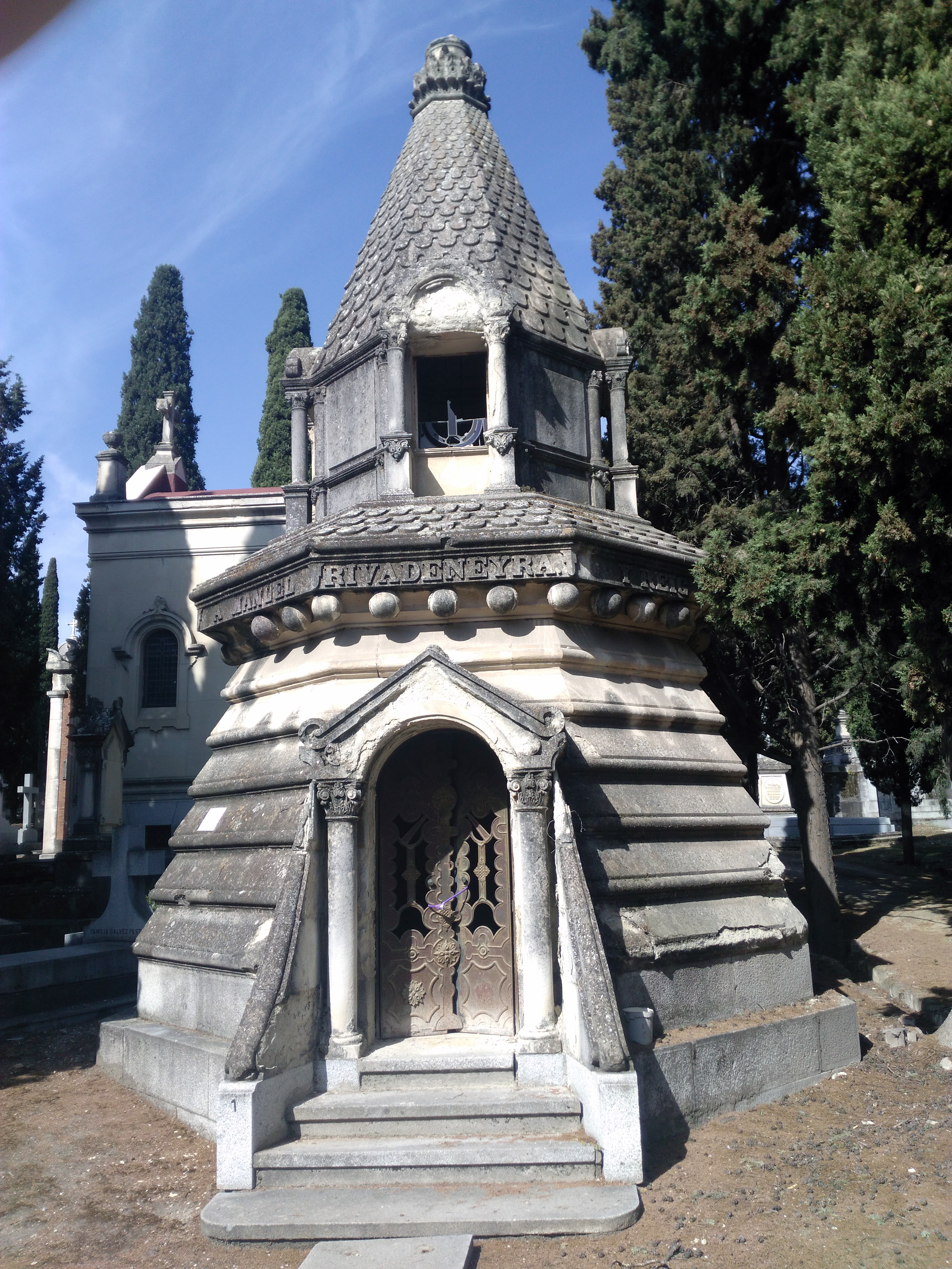 Panteón Manuel Rivadeneyra y Reig, patio de la Concepción, cementerio de San Isidro, Madrid.